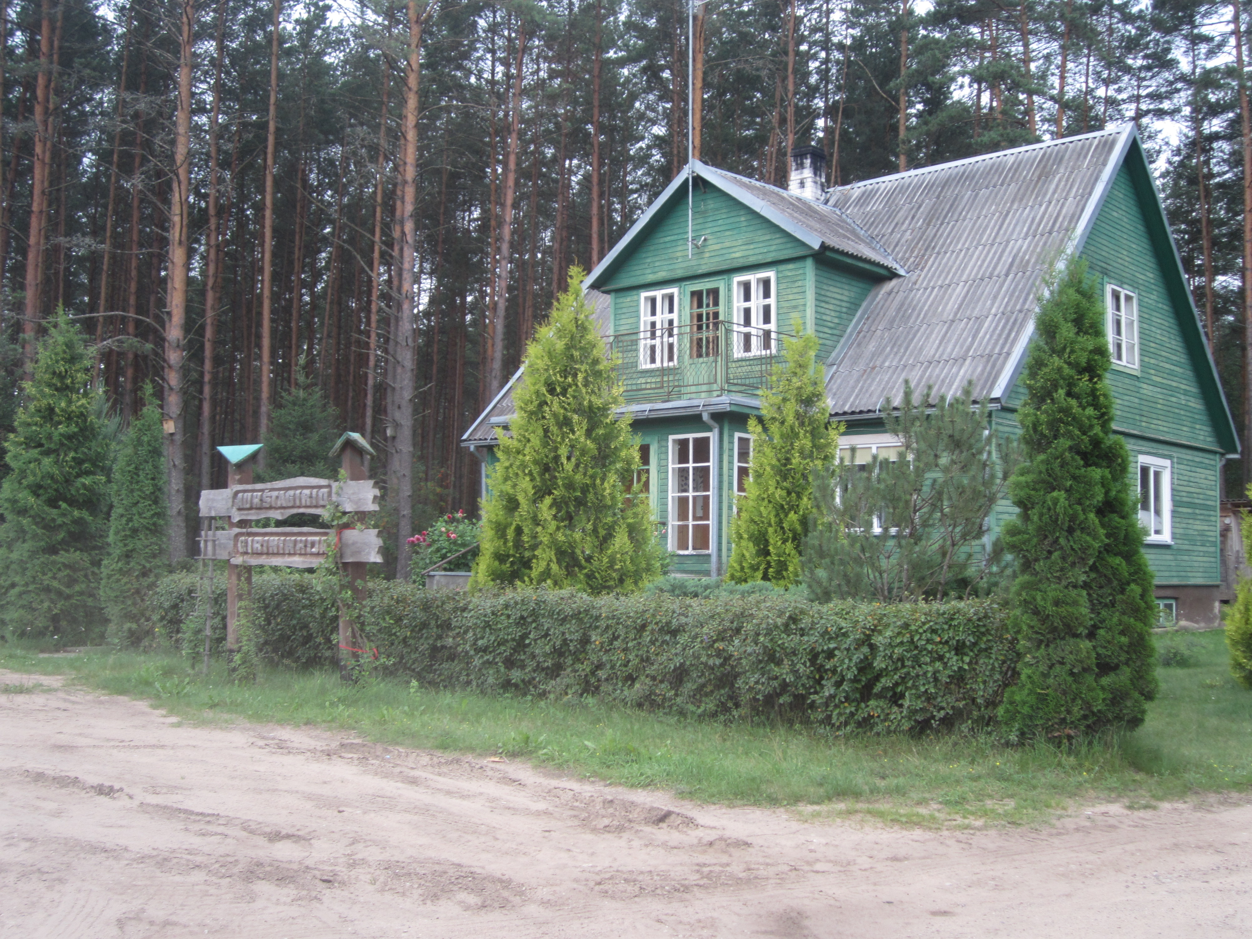 Aukštagirio girininkija, Liūlinė